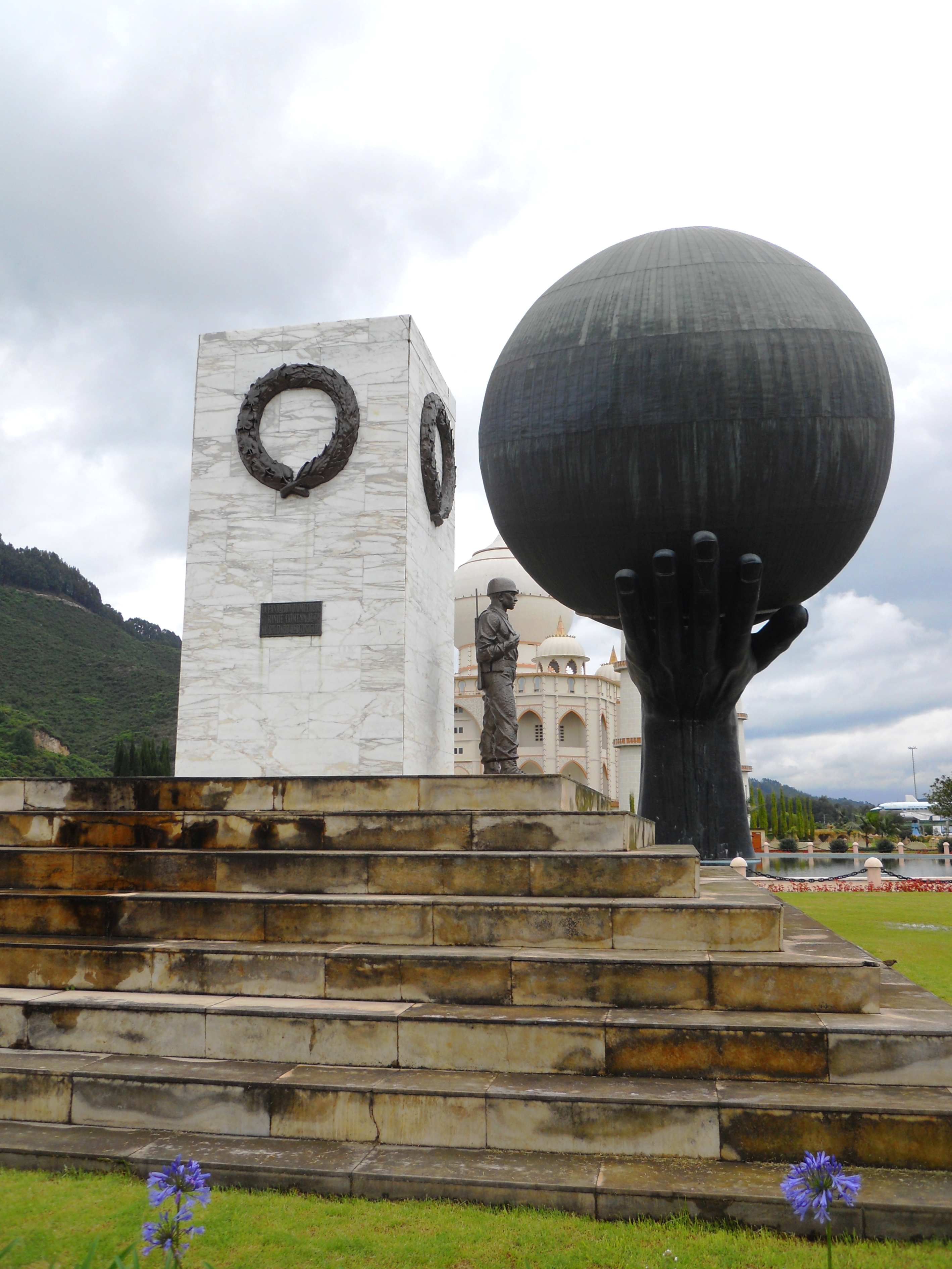 Monumentos en el parque Jaime Duque.